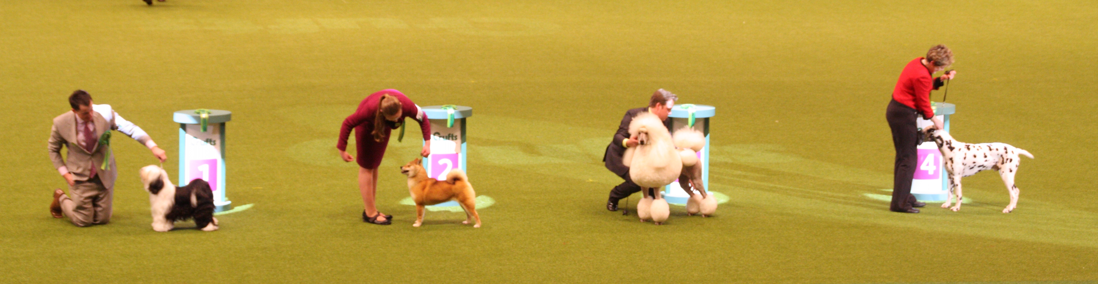 Best in Day